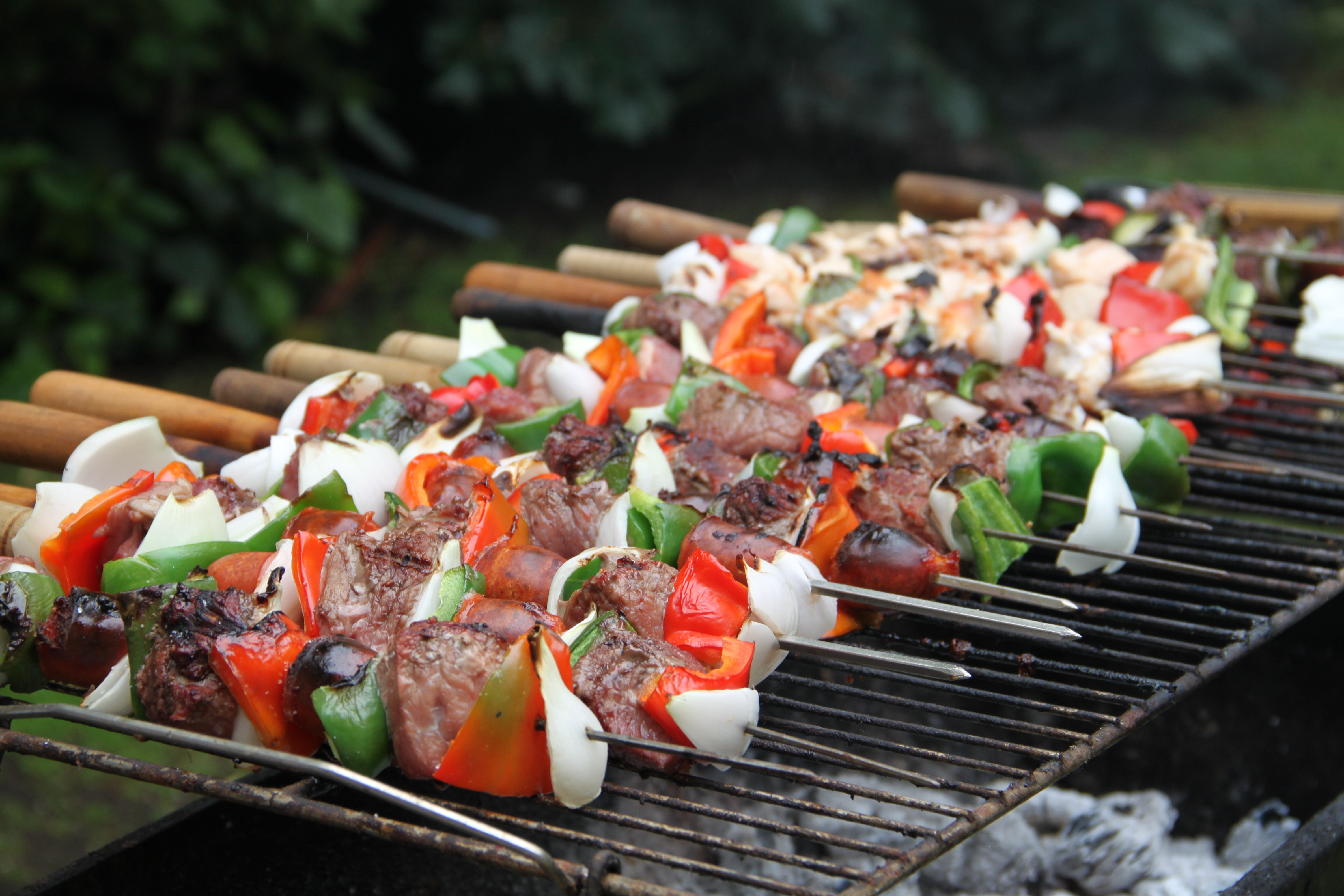 Comida deliciosamente típica Chilena!!!